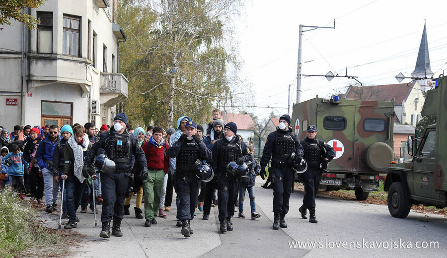 Slovenska vojska tudi med vikendom v velikem številu pri podpori Policiji.